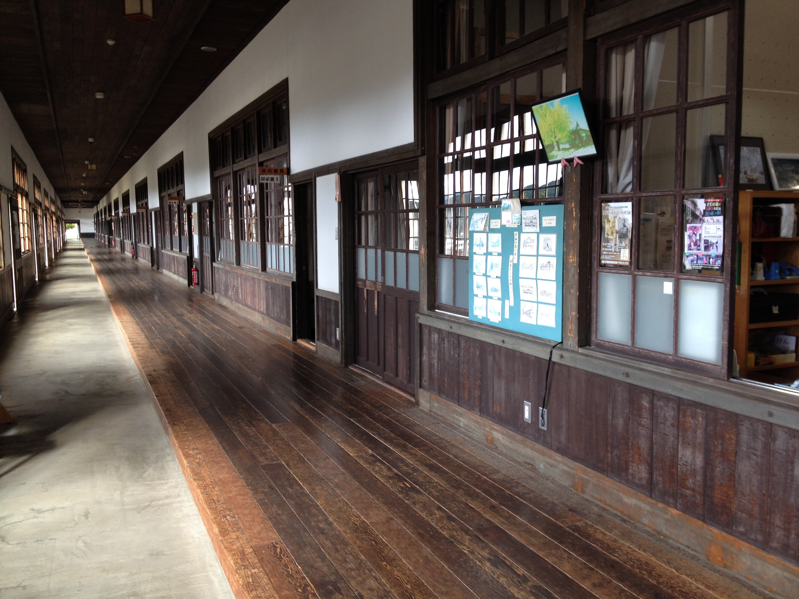 雑巾がけレースＺ－１グランプリ in うわの会場